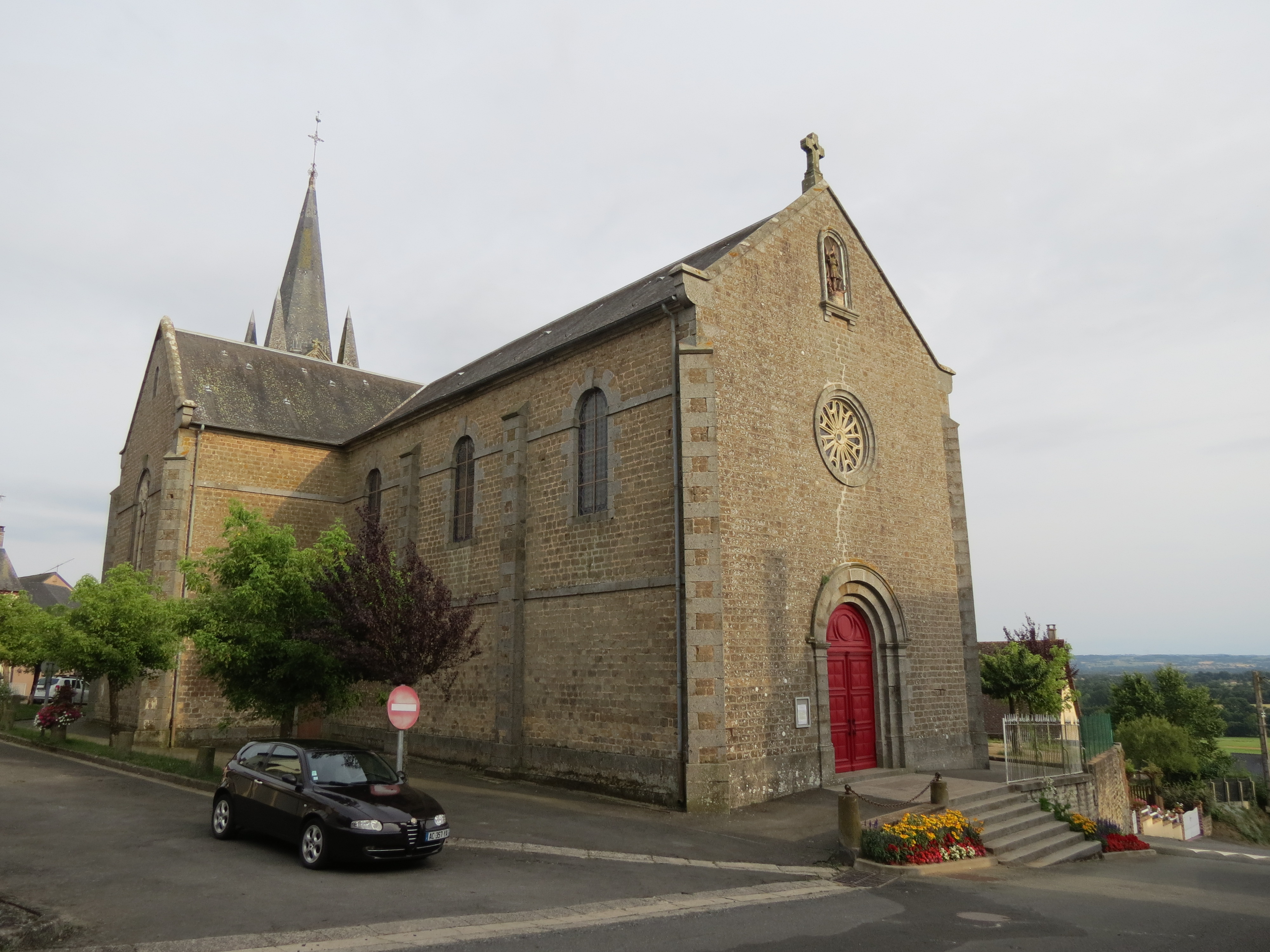 Église Notre-Dame-de-l'Assomption.